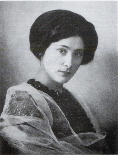 Саломея Андроникова